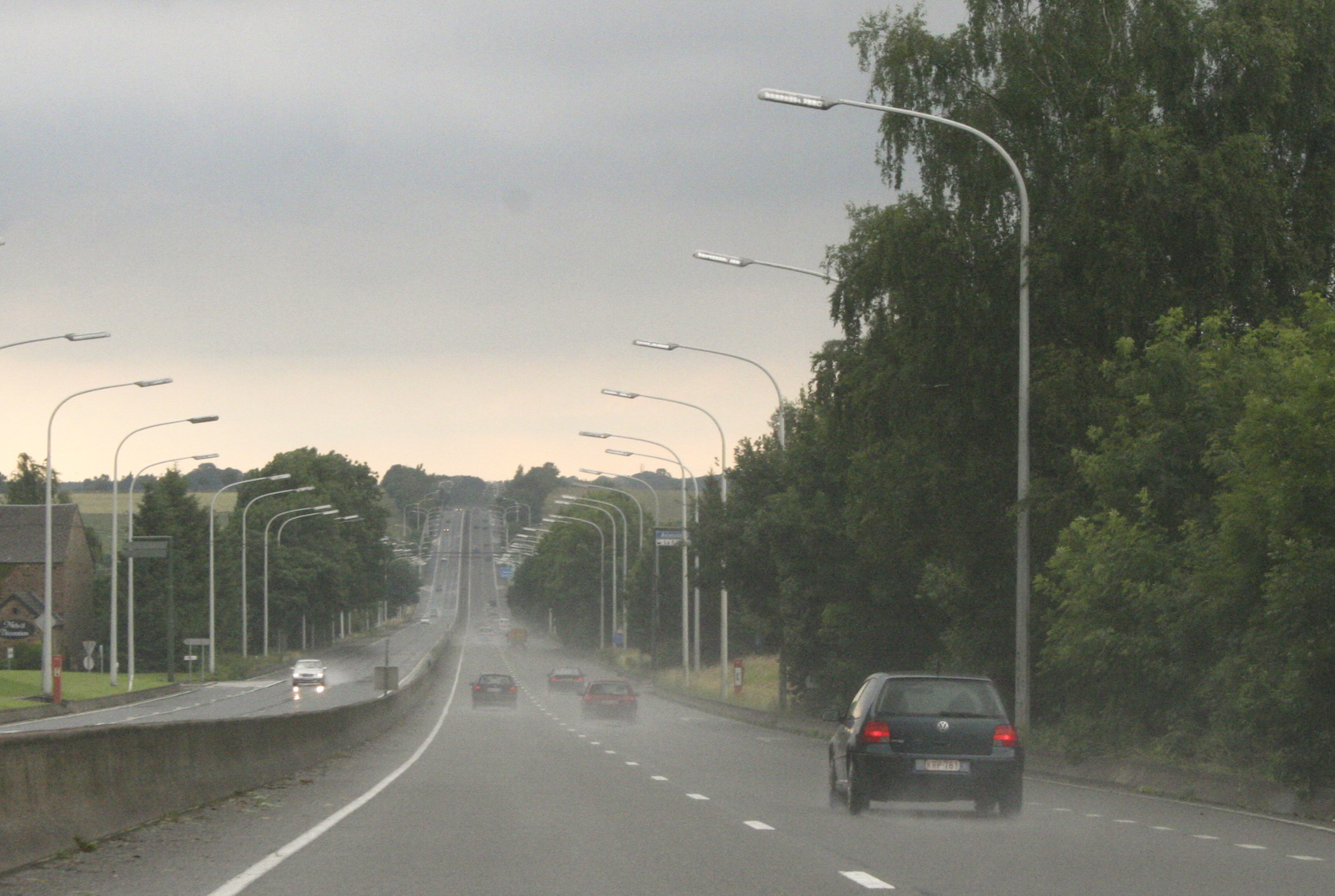 Photo de la route nationale 4 à hauteur de Assesse.